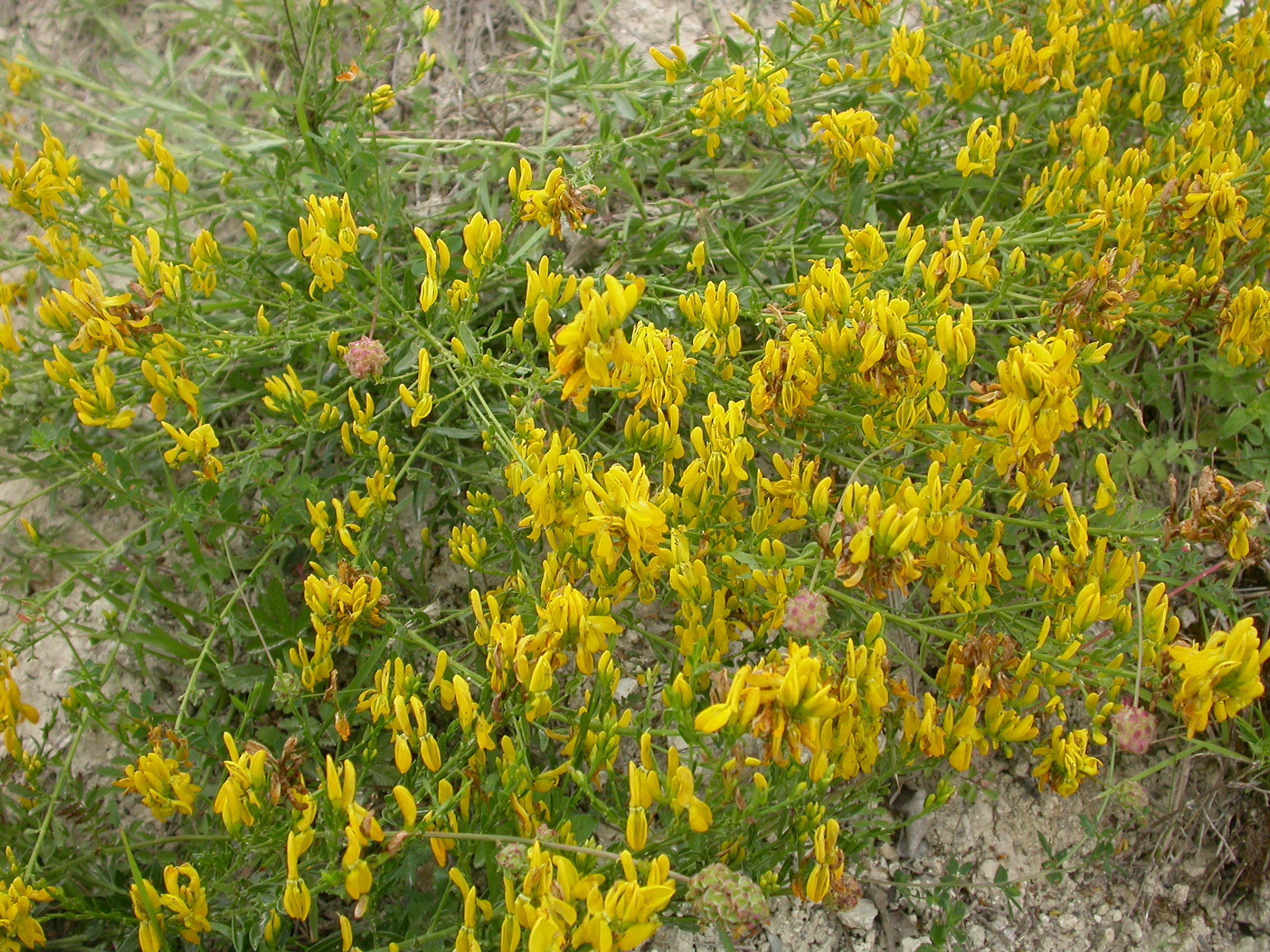 Genista tinctoria Mont-Saint-Père (Aisne), France